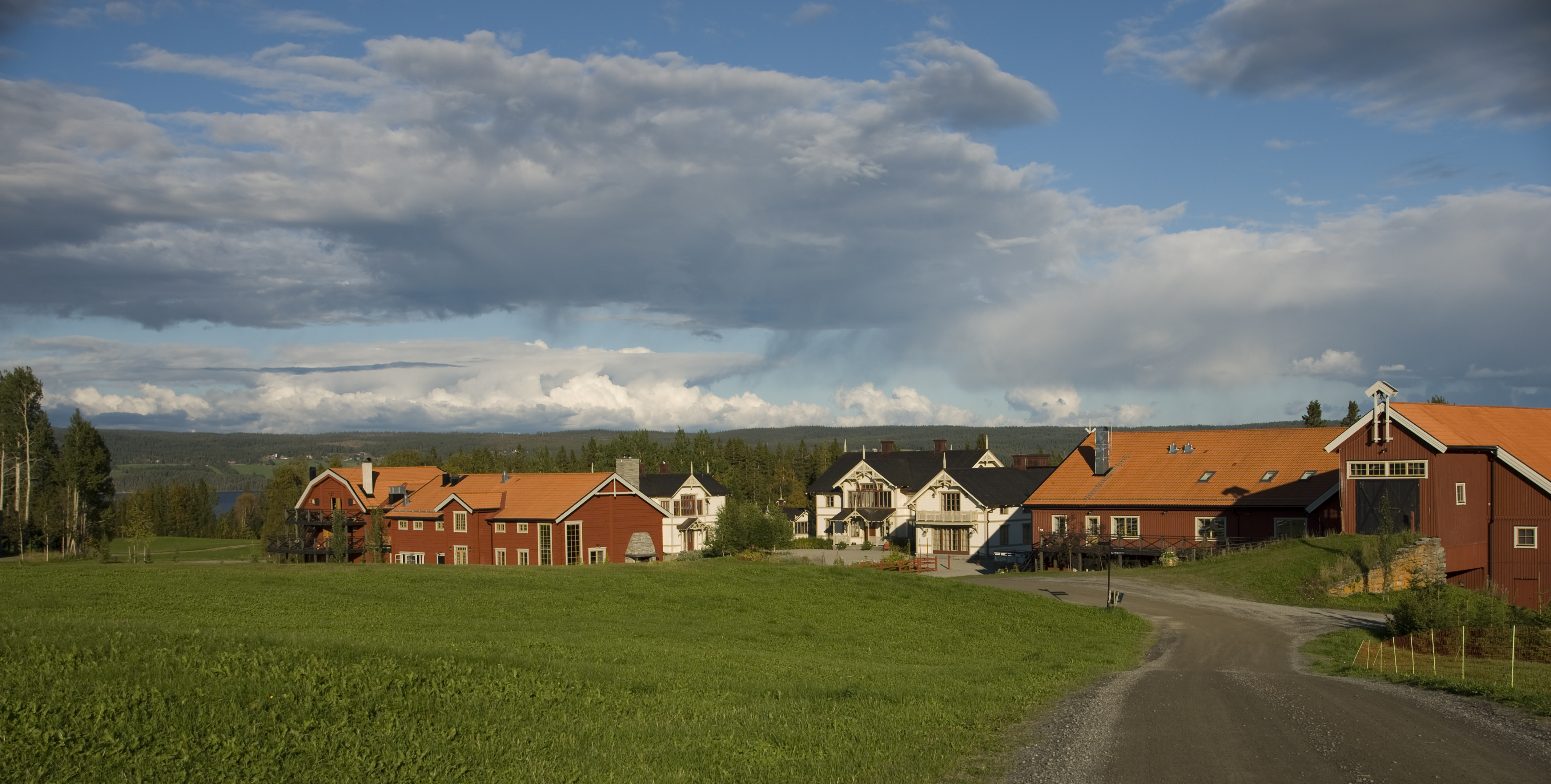 Totale von Fäviken